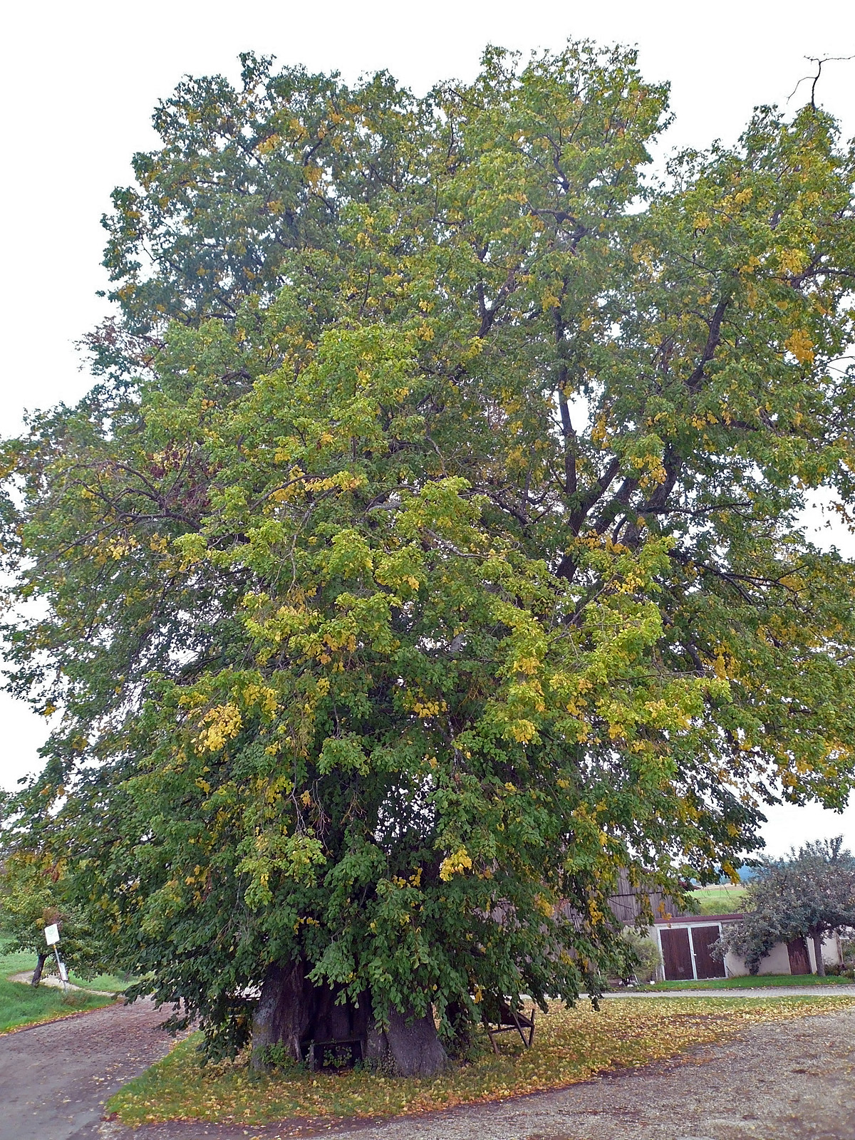 Kolbenhoflinde